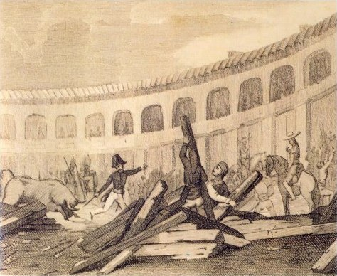 Bullanga (revuelta popular) de Barcelona, 1835.